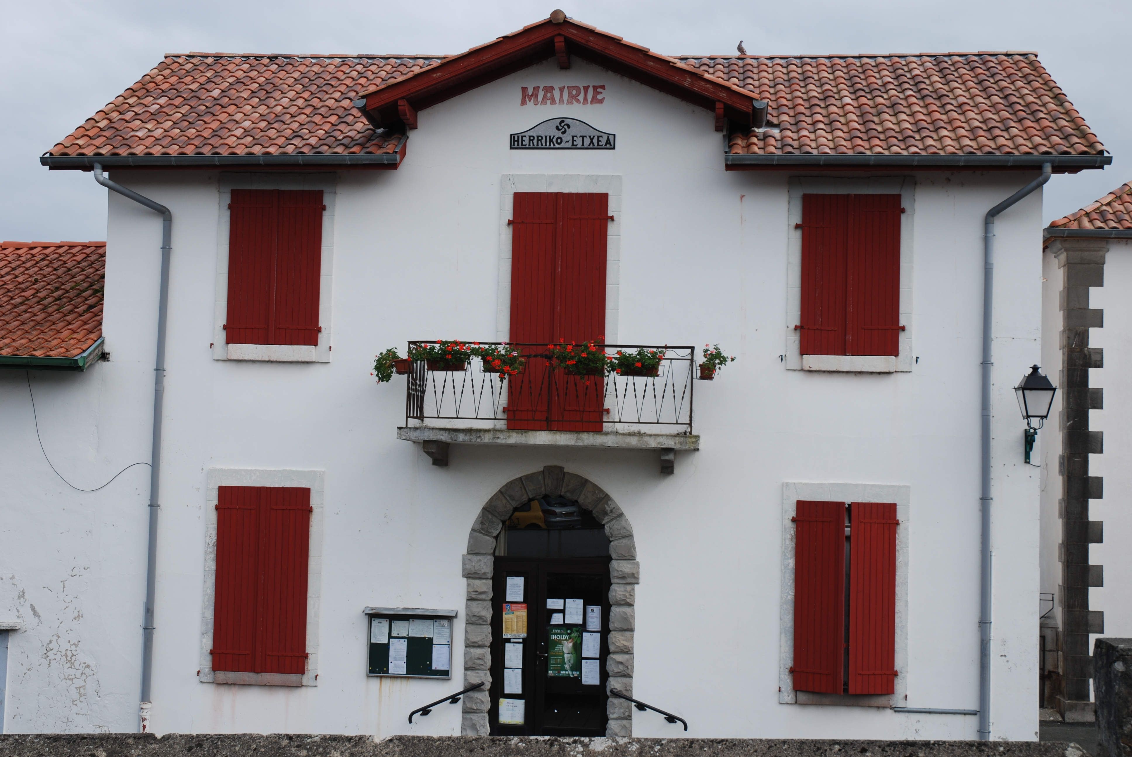 Iholdy, la mairie